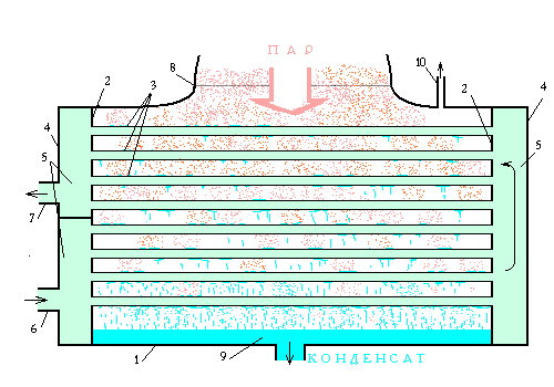 Surface condensor for a steam turbine